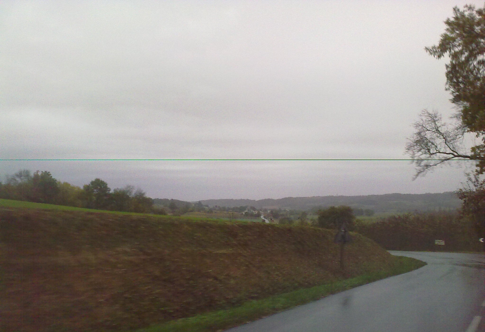 Conchez-de-Béarn